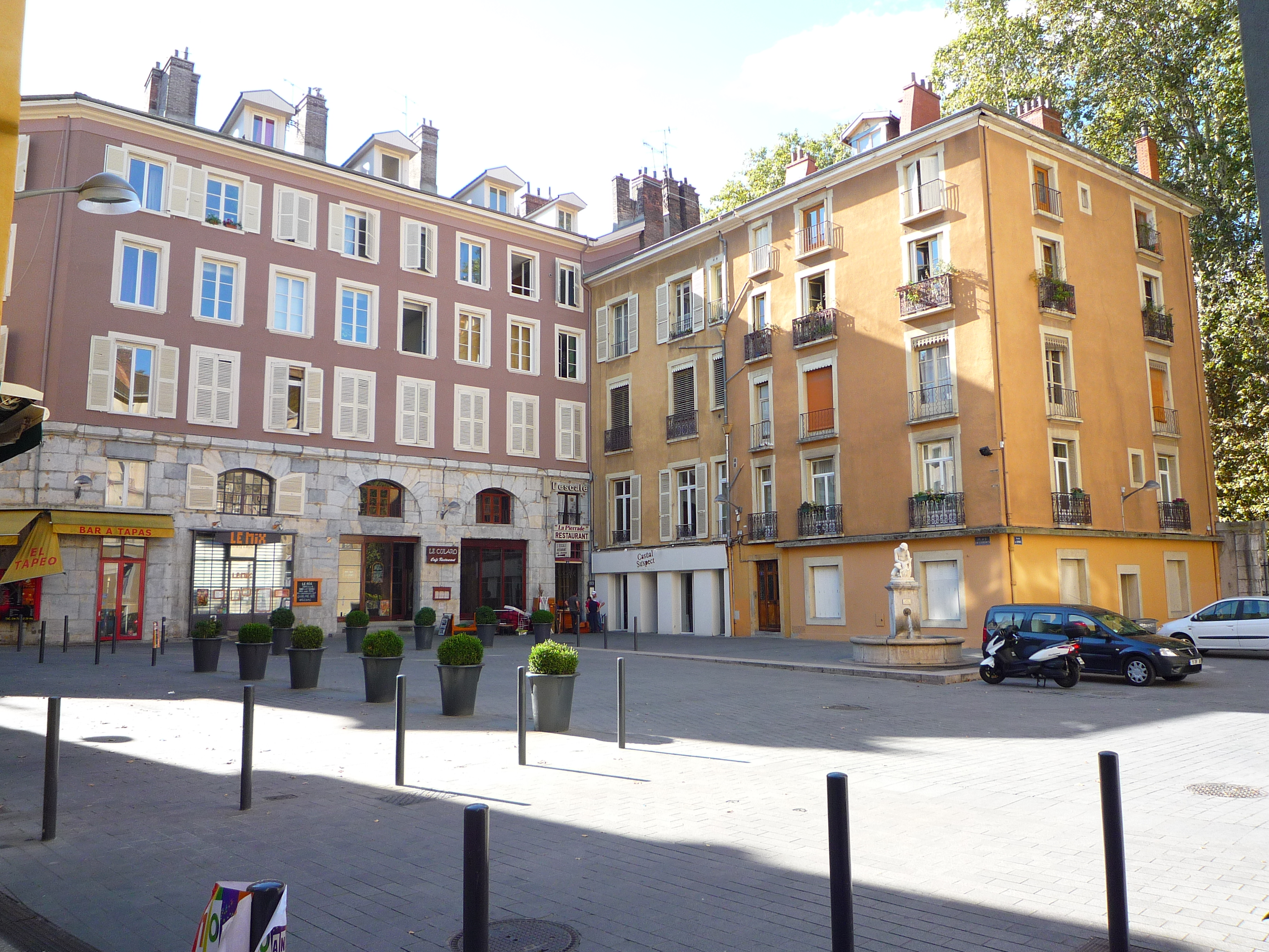 Place de Gordes à Grenoble